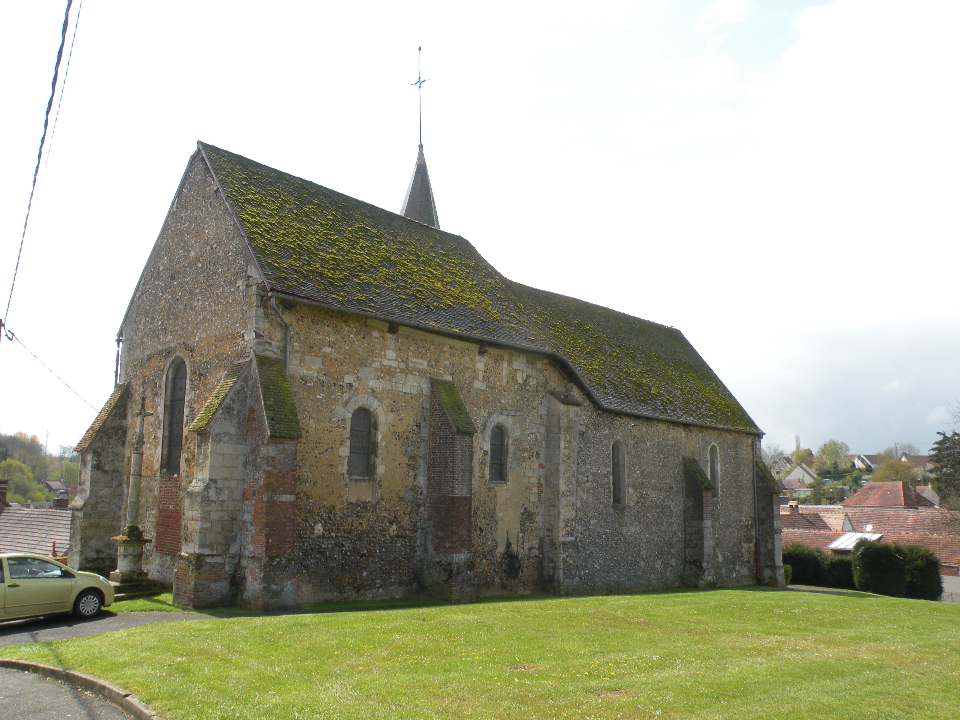 église de Valdampierre